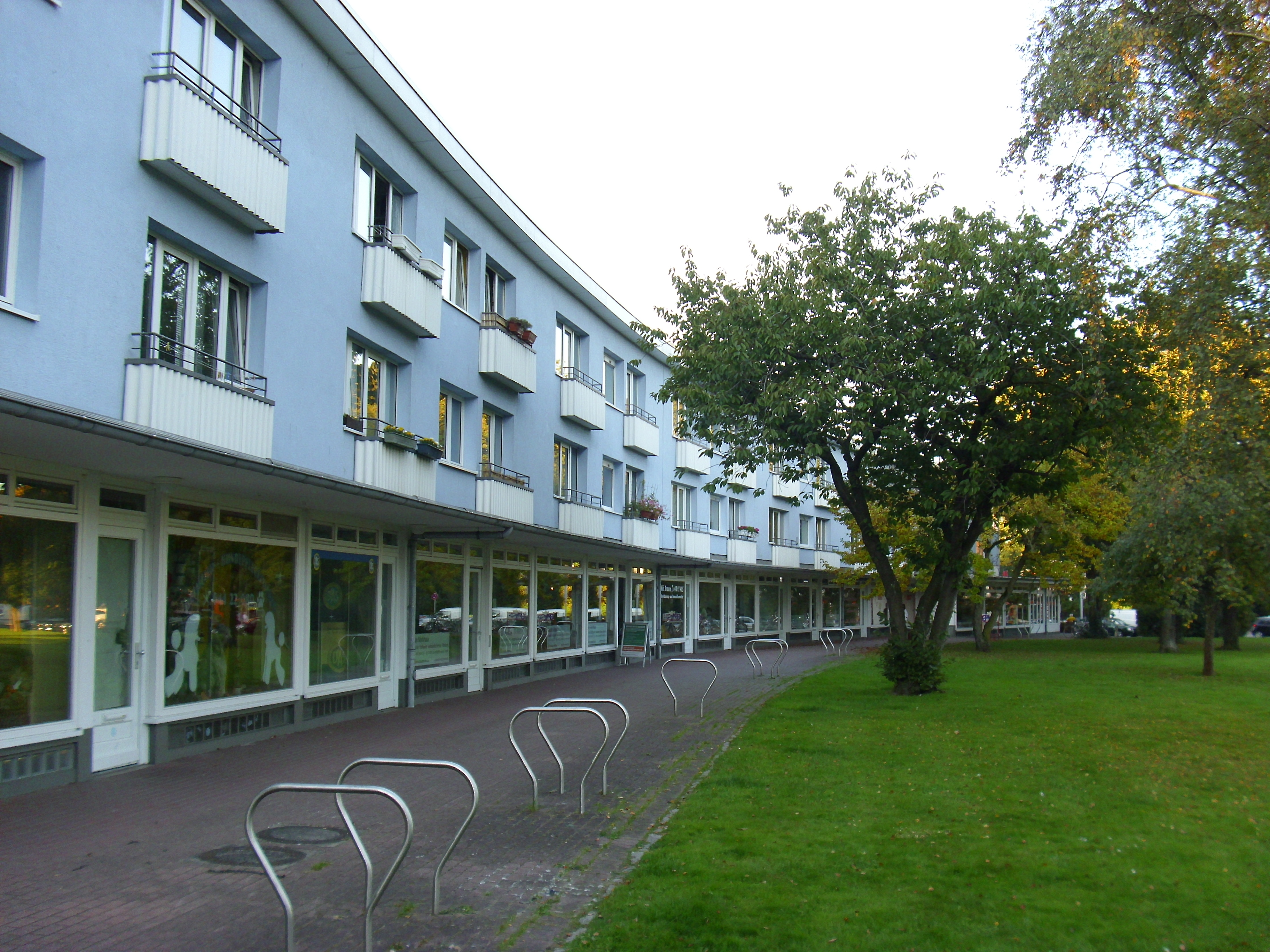 Ladenzeile in der Gartenstadt Farmsen, Ecke Am Luisenhof/August-Krogmann-Straße This is a photograph of an architectural monument.